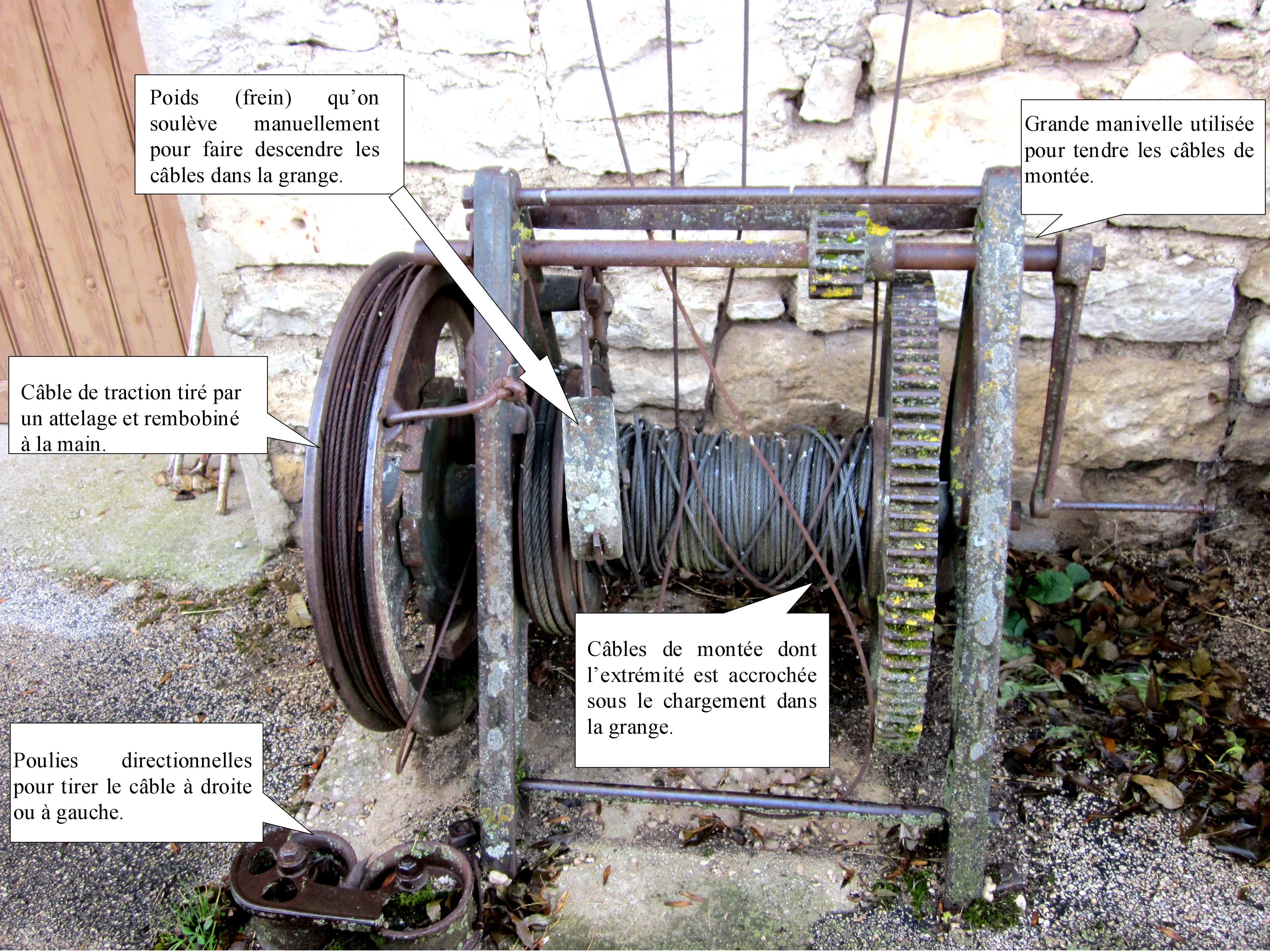 Treuil de déchargeuse destiné à hisser le chargement de fourrage d'un chariot au grenier dans une grange. Village du département du Jura.